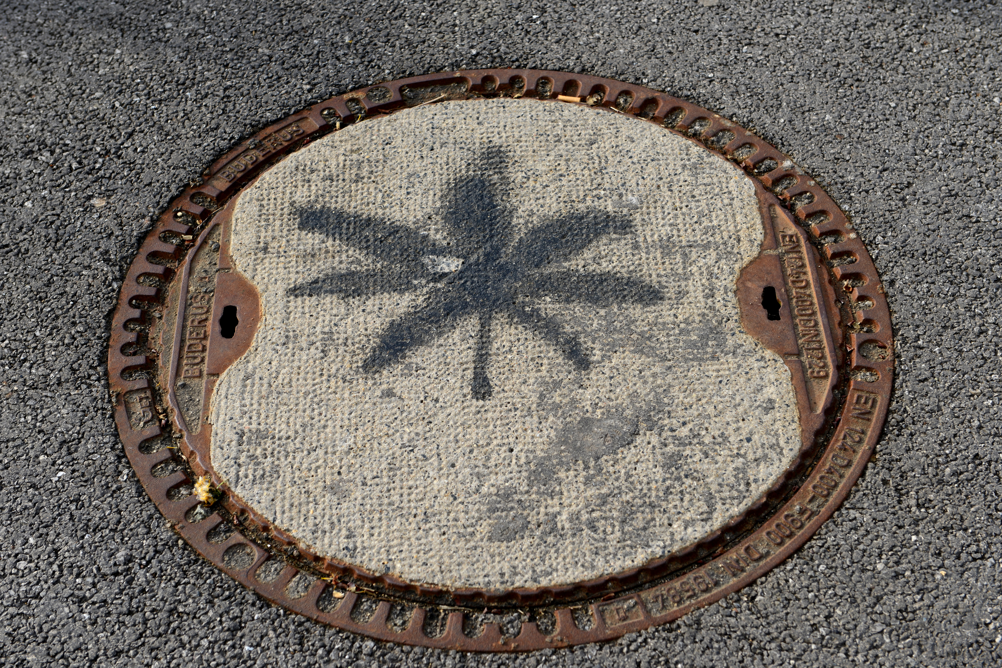 Dorënner leeft d'Diddelengerbaach.